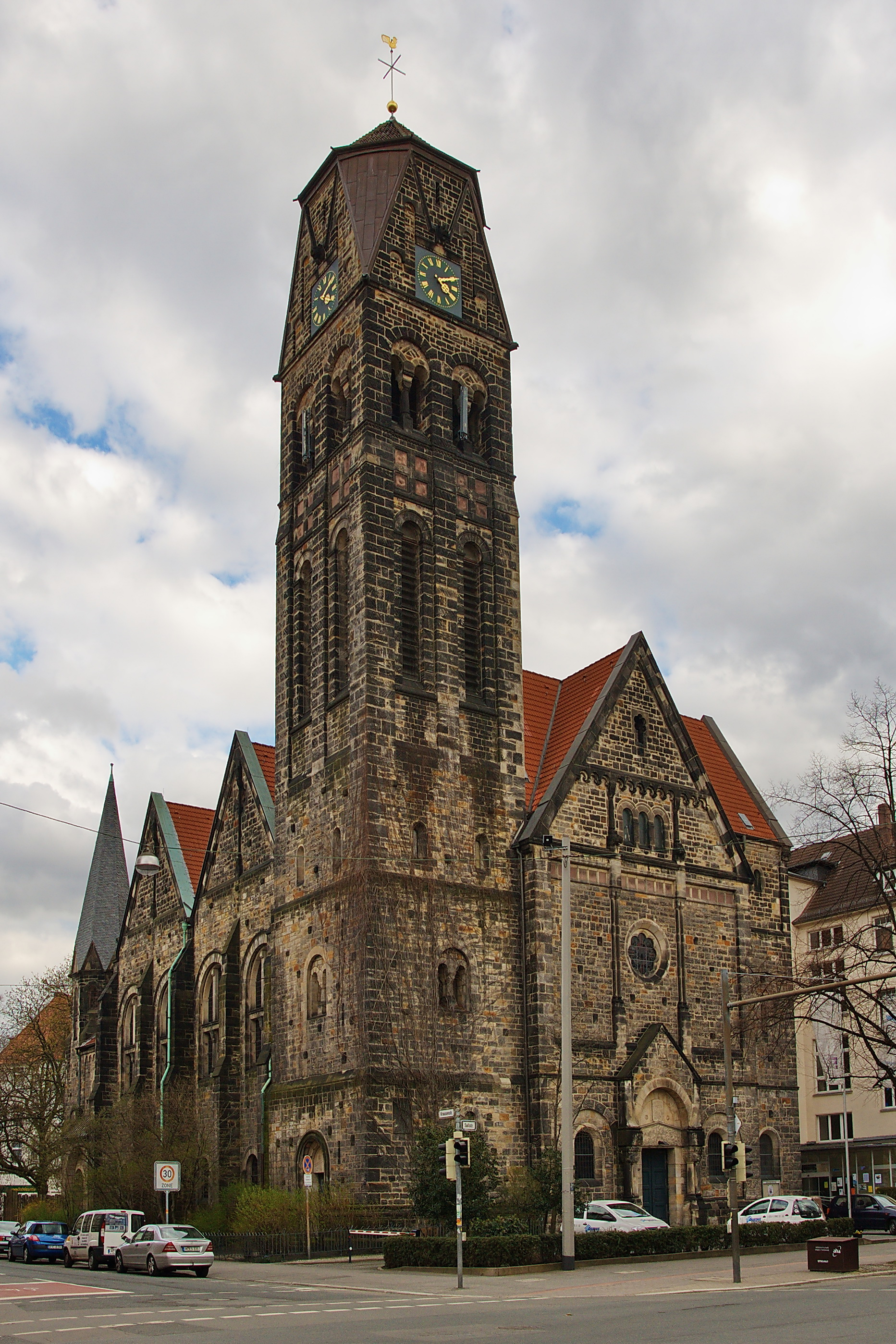 Nazareth-Kirche in der Südstadt von Hannover, Niedersachsen, Deutschland